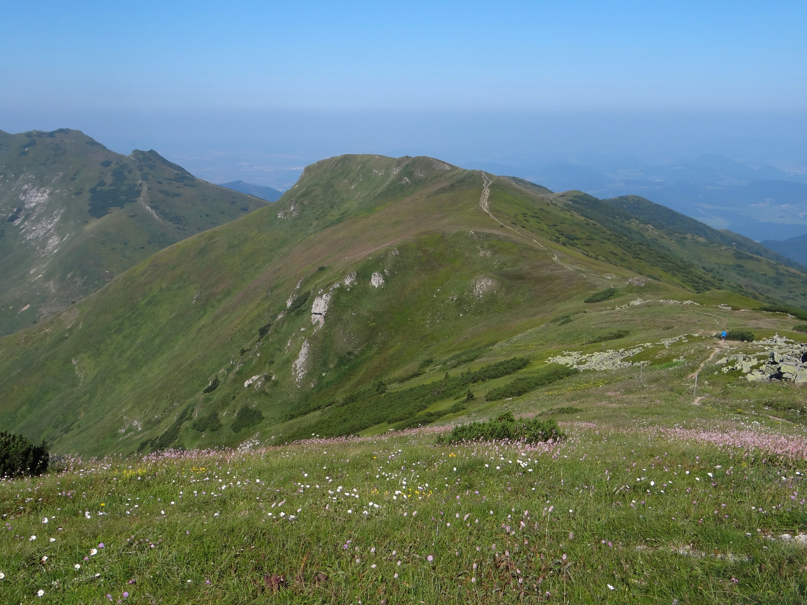 Pekelník, view from Veľký Kriváň